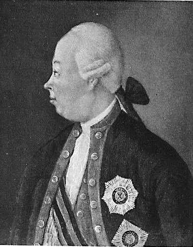 Graf Petr Aleksandrovich Rumiantsev-Zadunaiskii, 1725-1796